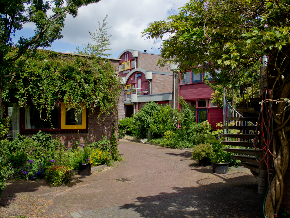 Zicht op de Wandelmeent in de Hilversumse Meent. Het eerste Centraal Wonen/Cohousingproject van Nederland.